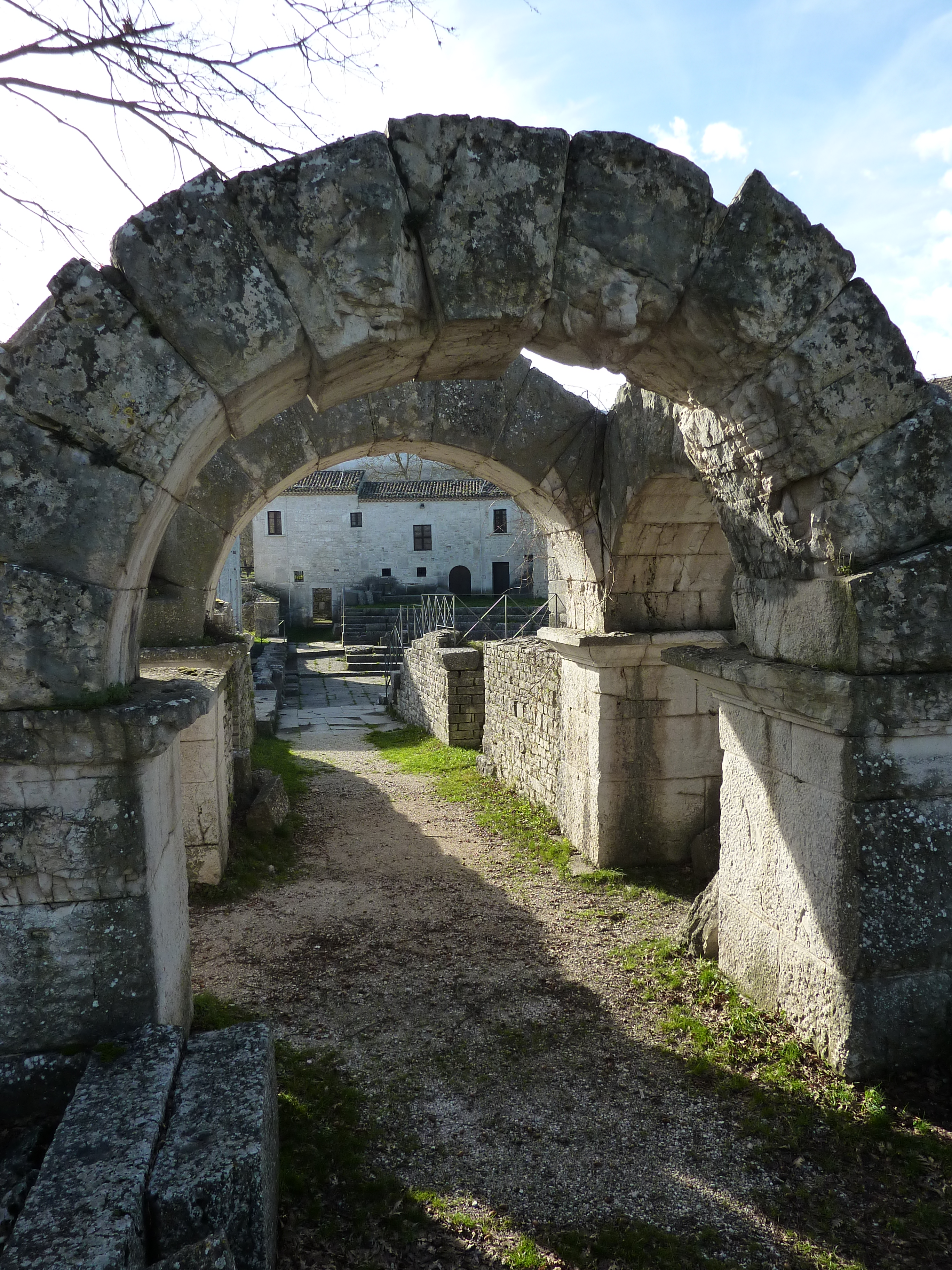 Altilia, Sepino - Ingresso anfiteatro